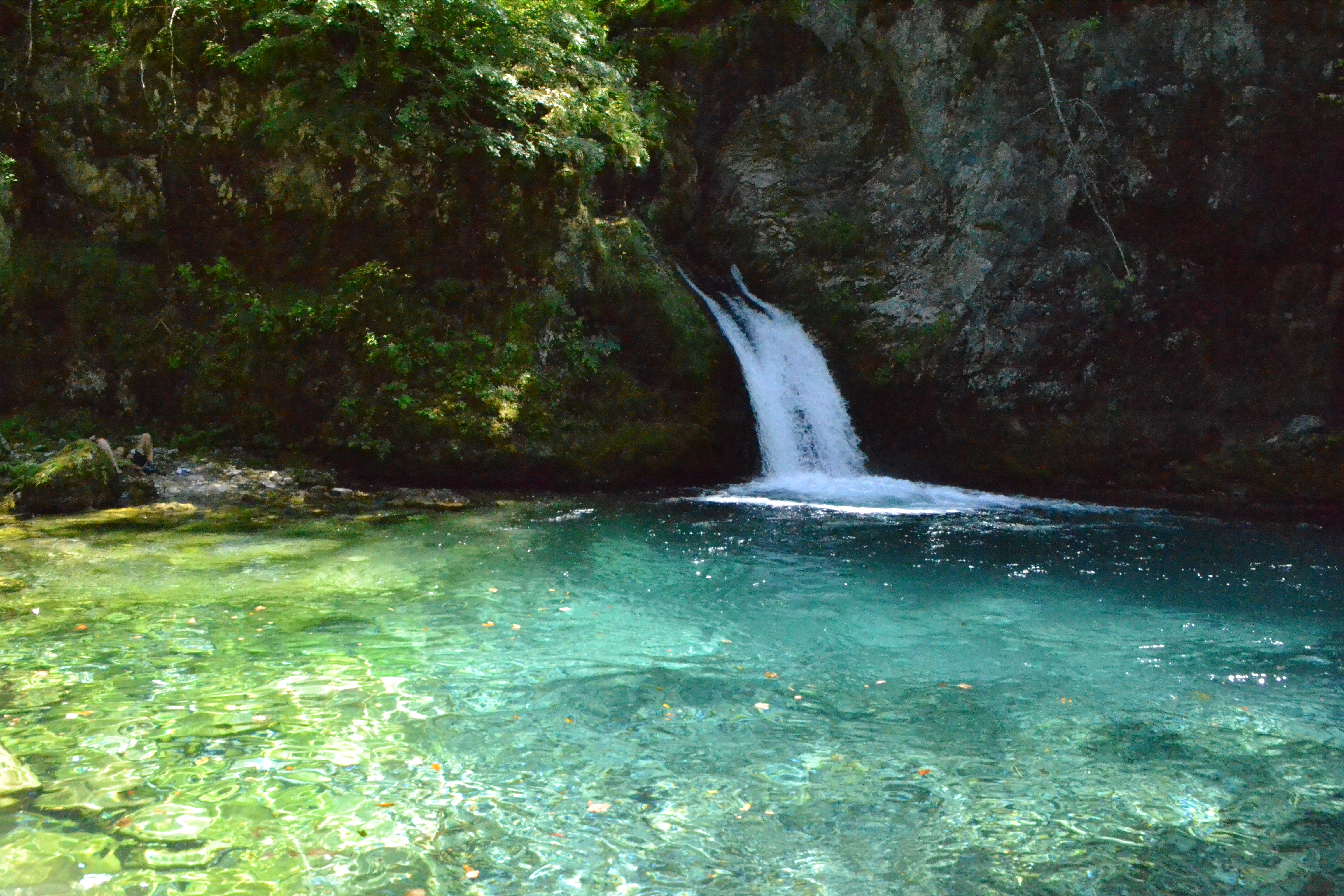 Thethi, Shkoder